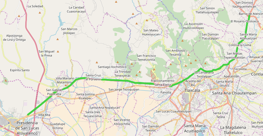 Recorrido de la Carretera Federal por los estados de Puebla y Tlaxcala